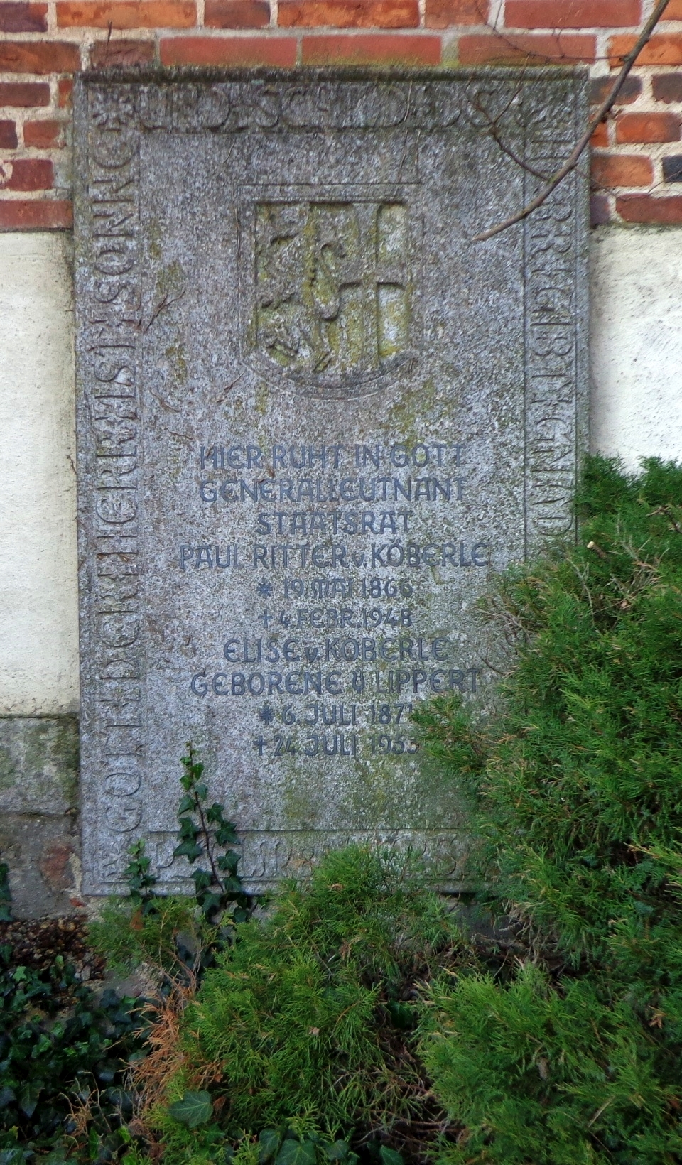 Ortenburg-Steinkirchen: St. Laurentius-Kirche, Grabstein des bayerischen Generalleutnants Paul Ritter von Köberle und seiner Gemahlin